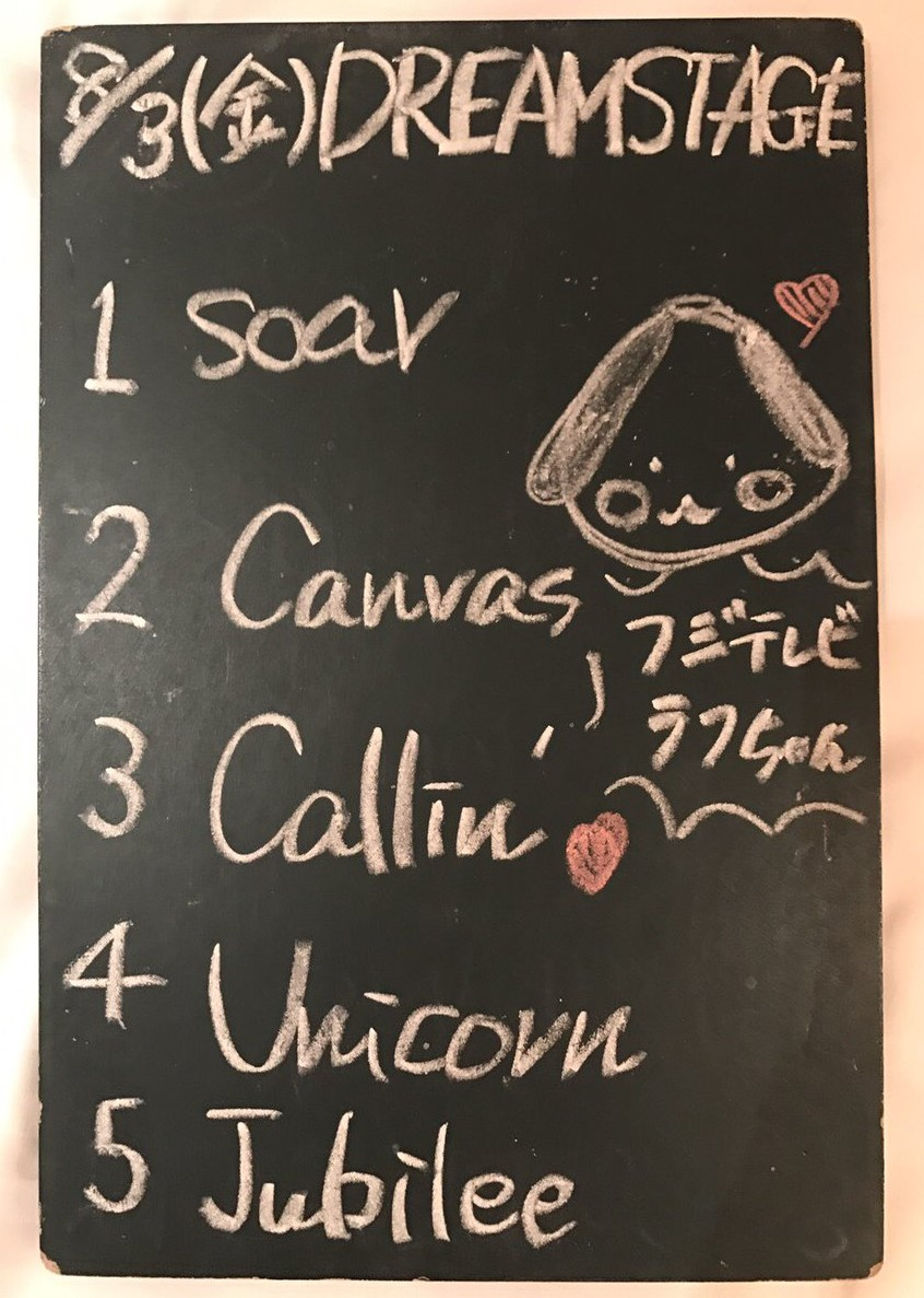 amiinAセトリボード(20180803(2))